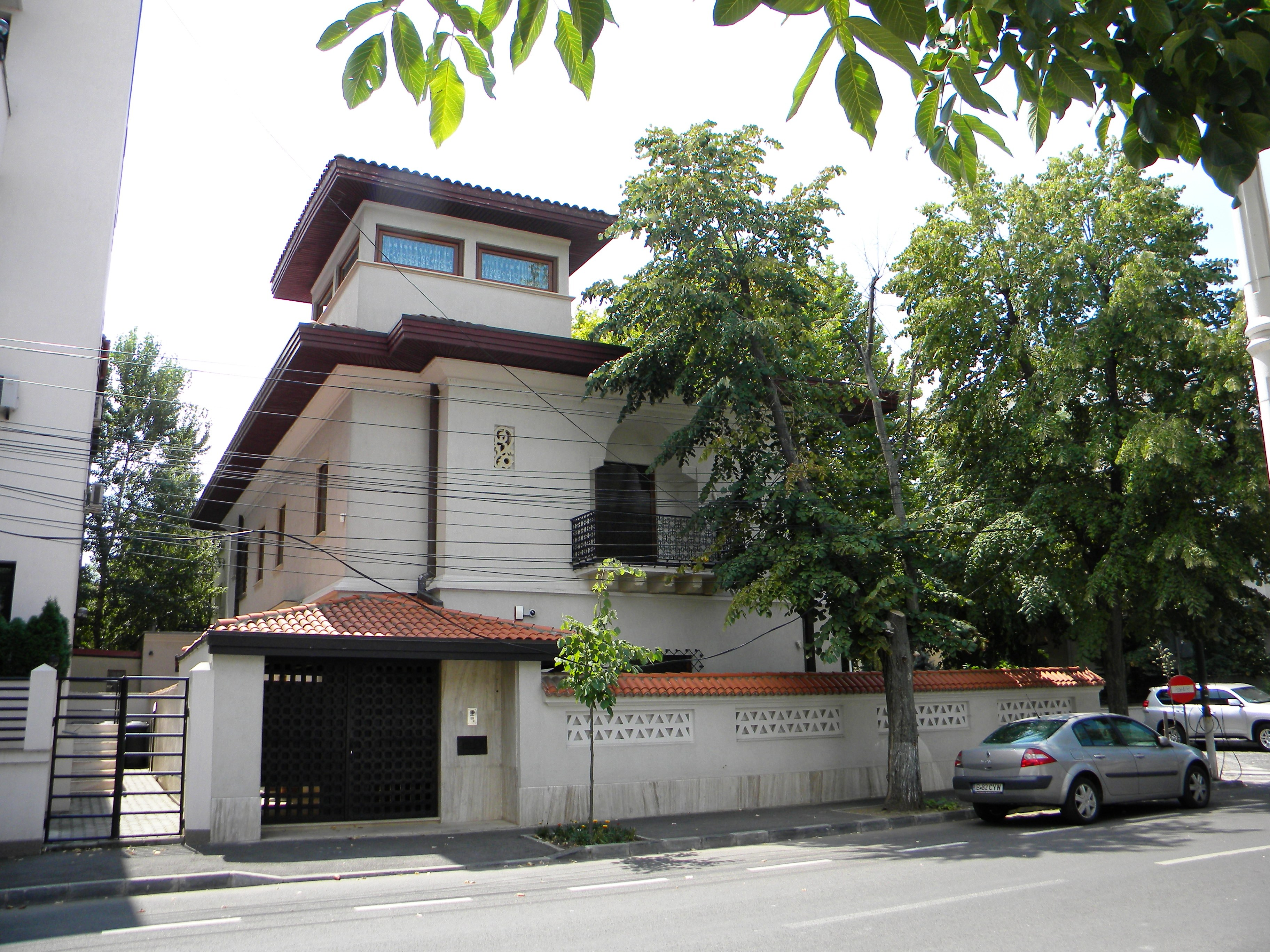 Imobil pe Str. Armindenului, nr. 4, Bucuresti sect. 1